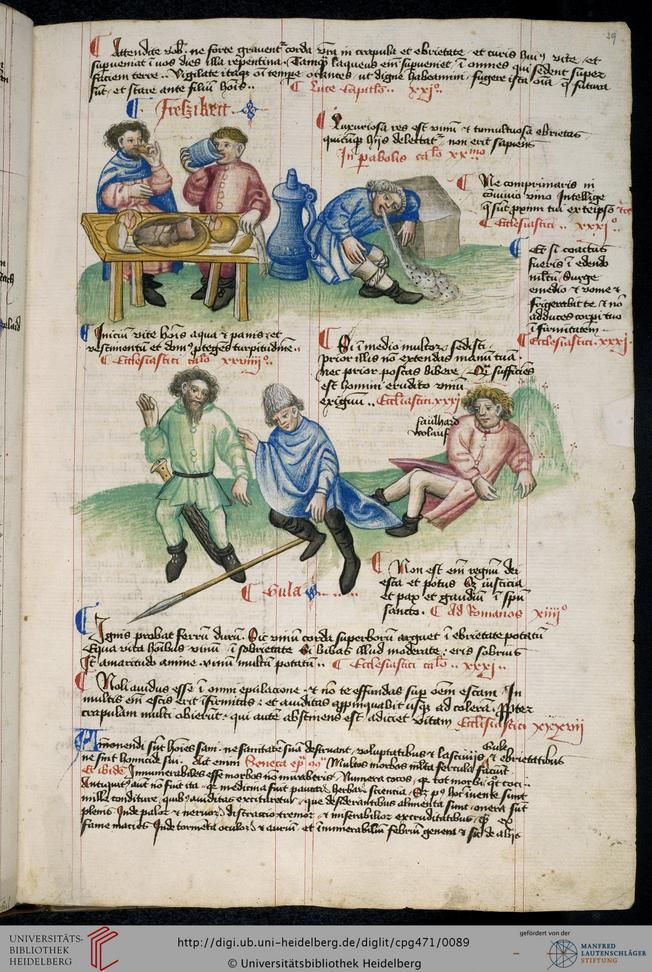 Hugo von Trimberg "Der Renner"